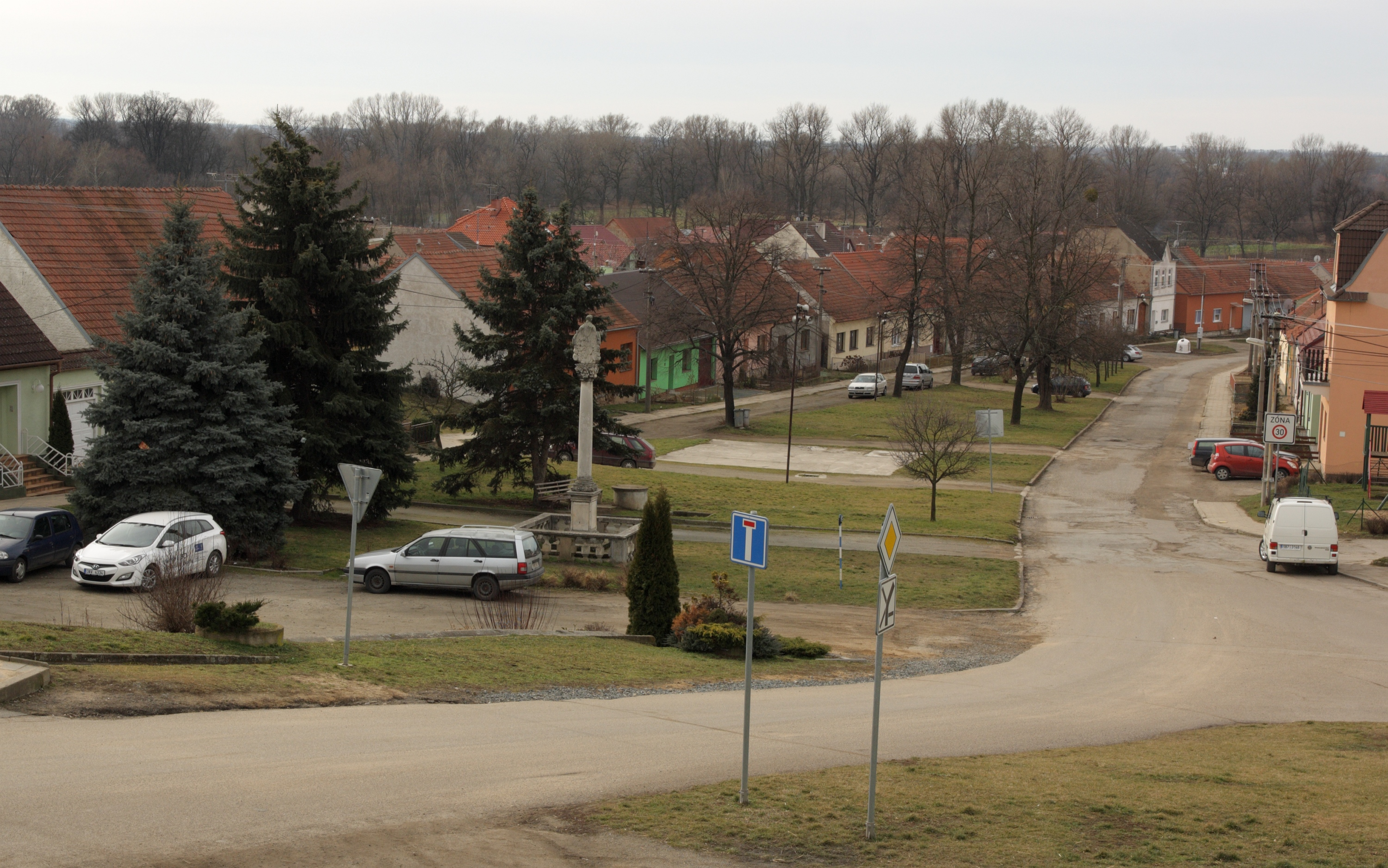 Medlov - náves.